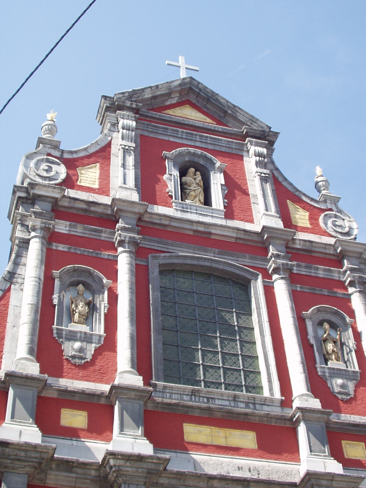 Eglise baroque Saint Gérard. Auteur: Julien Vandeburie